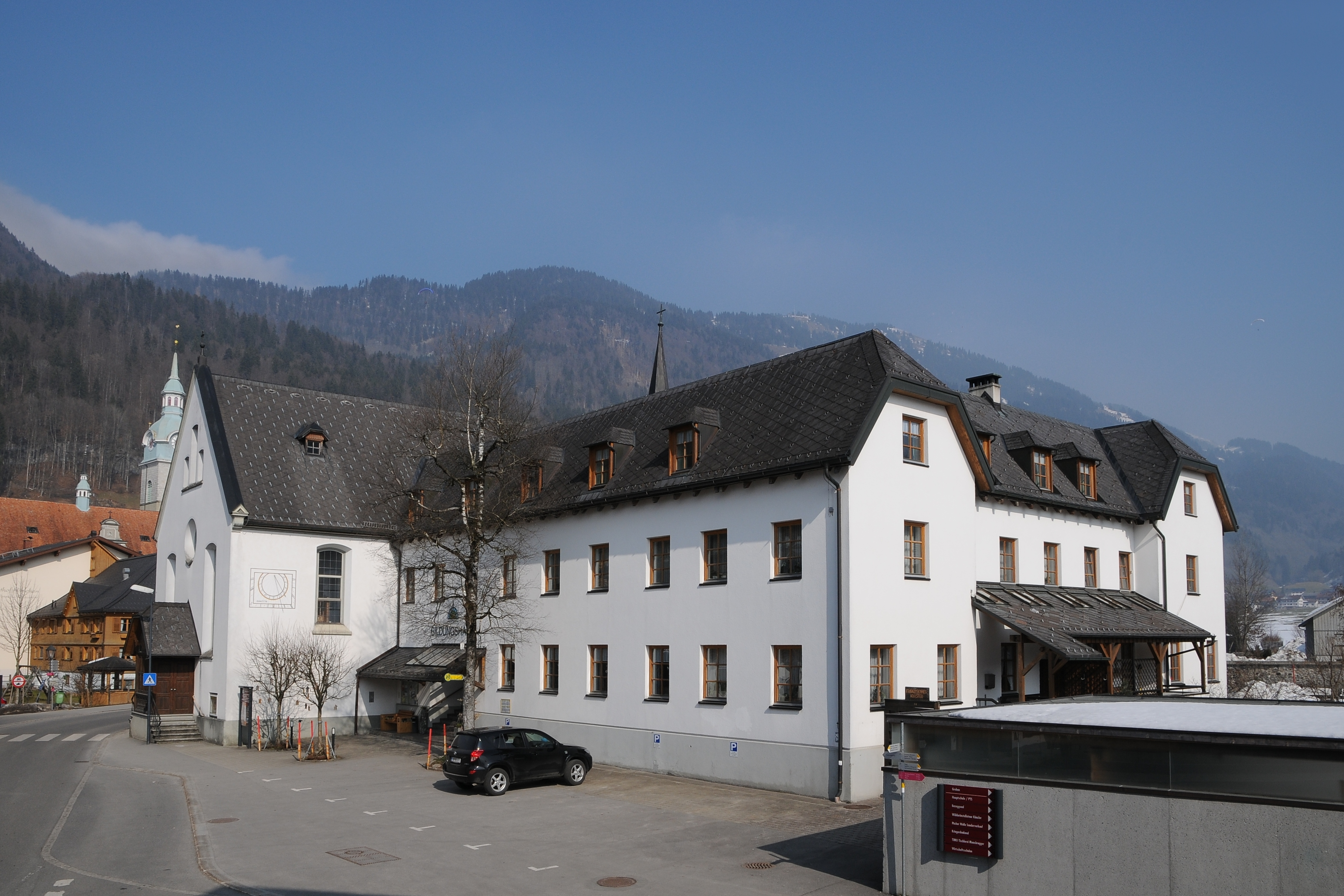 Das Kapuzinerkloster am Platz 38 in Bezau wurde im Jahre 1904 von Johann Bertolini erbaut.